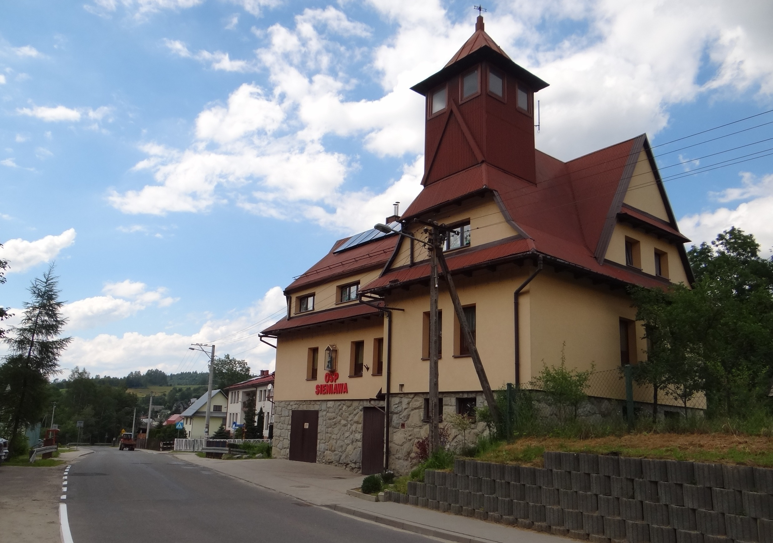 Remiza OSP w Sieniawie